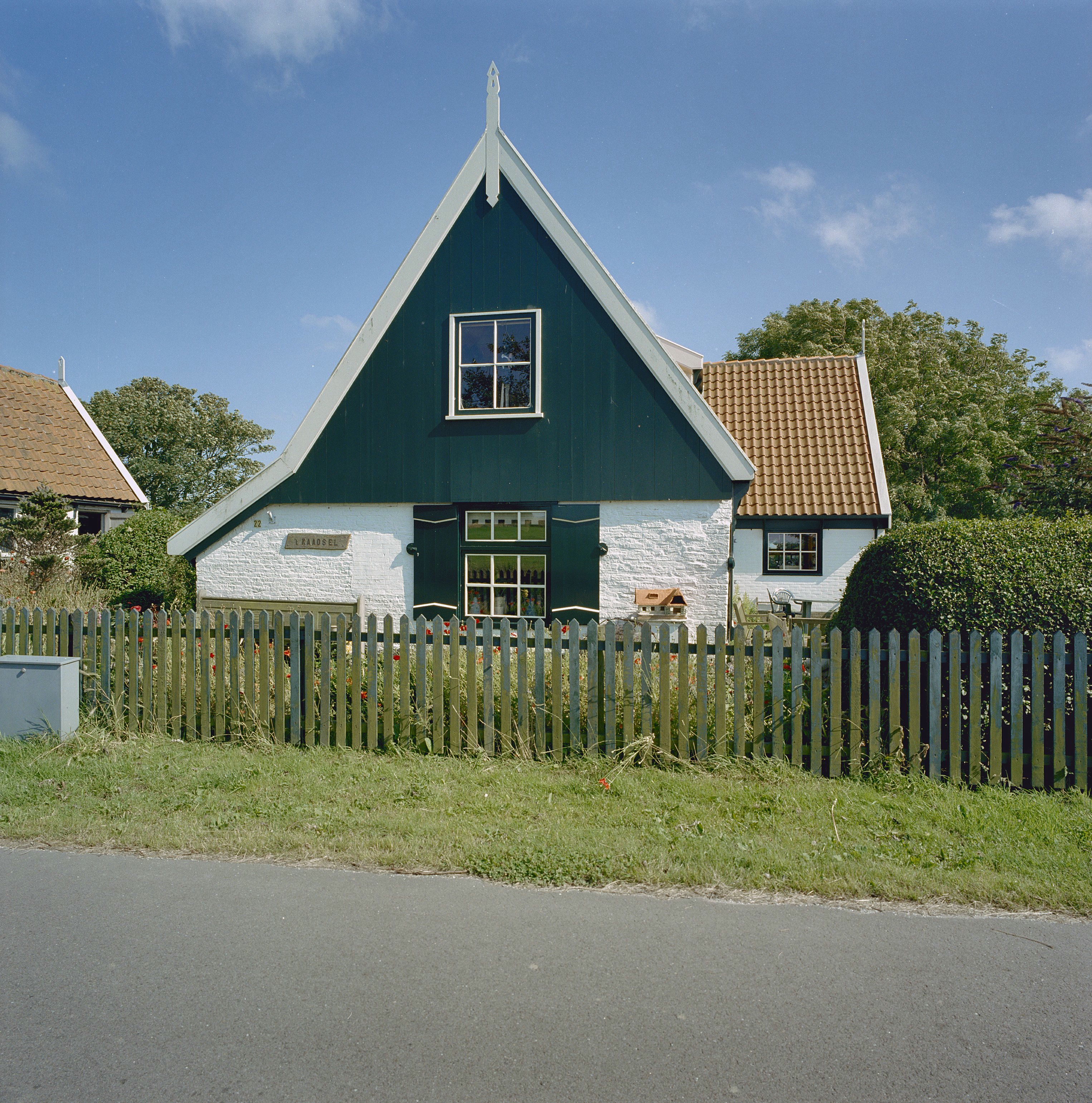 Overzicht achterzijde met zitgedeelte